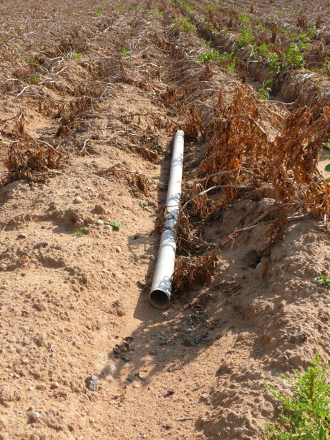 Tubo metálico, mucho más seguro, pero más incómodo de manipular, donde se introduce veneno en grano utilizado para combatir la plaga de topillos (Microtus arvalis astorianus) en Castilla y León, 2007